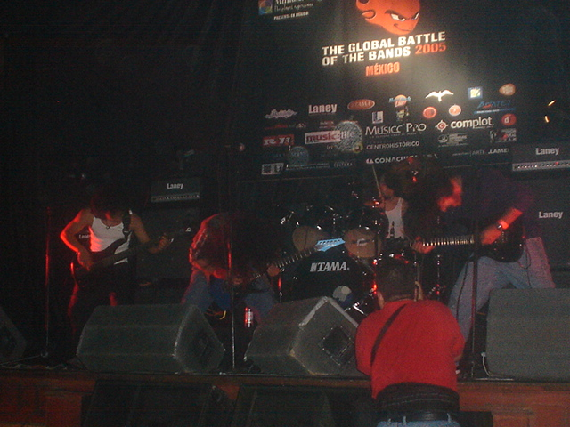 Valhalus participando en la global battle of the bands México